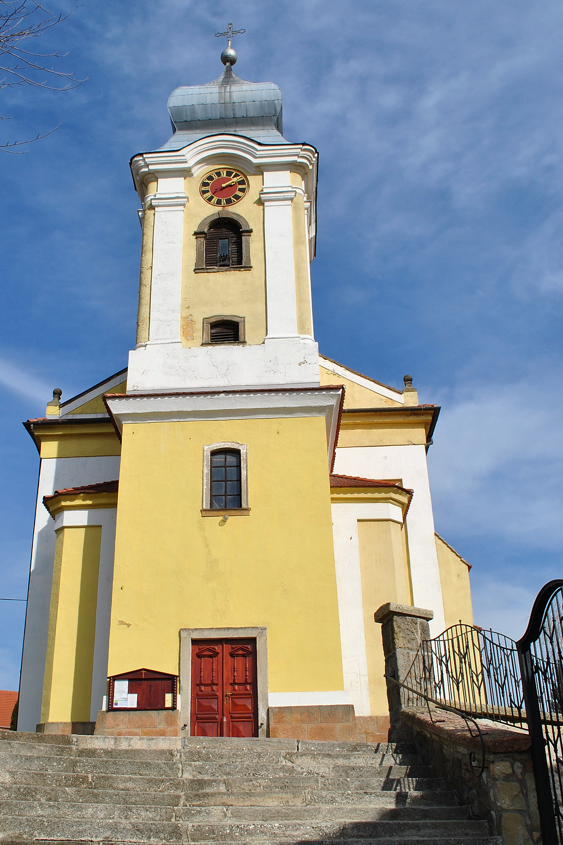 Szent Vid és 14 segítő szent Római katolikus templom (Pilisborosjenő, Templom tér)